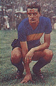 Jaime Sarlanga futbolista de Boca juniors de los años '40